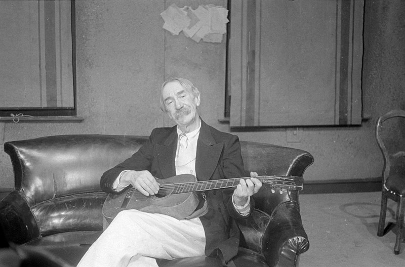 Original image description from the Deutsche FotothekPaul Bildt als Prof. Serebrjanow, Paula Denk als Helena Andrejewna, seine Gattin, des weiteren Heinrich Greif, Walter Richter als I. P. Wojnitzki und Ruth Schilling